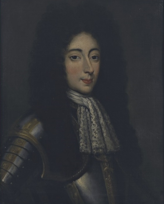 ritratto di Francesco Maria II Pico (+1747), ultimo duca della Mirandola